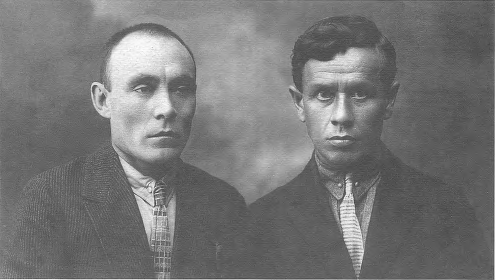 Башҡортса: Ғәзиз Әлмөхәмәтов һәм Солтан Ғәбәши. Өфө, 1937 йыл